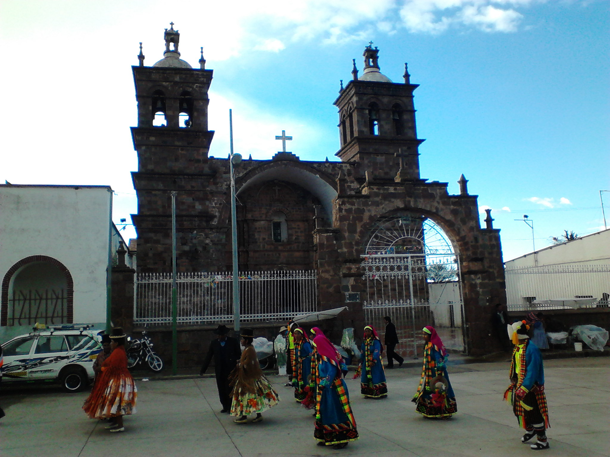 Iglesia de Guachi durante una festividad